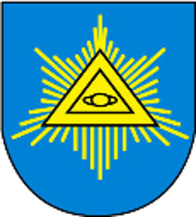 Herb Bronowa w powiecie bielskim, gminie Czechowice-Dziedzice